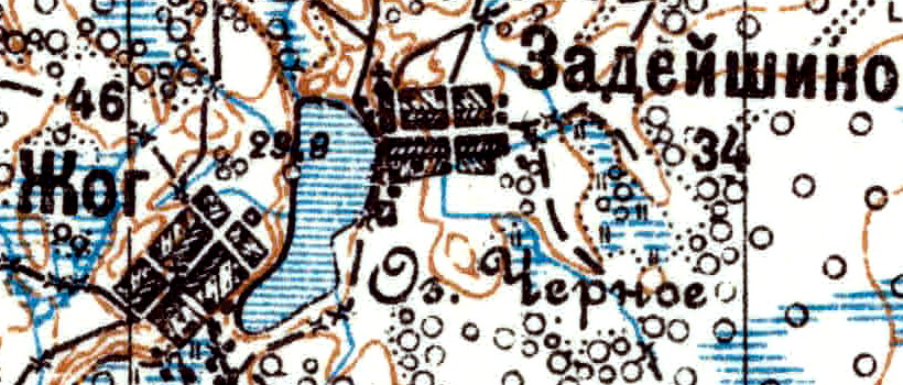 Топографическая карта Ленинградской области, квадрат VIc-26 (Ставотино), деревня Задейшино